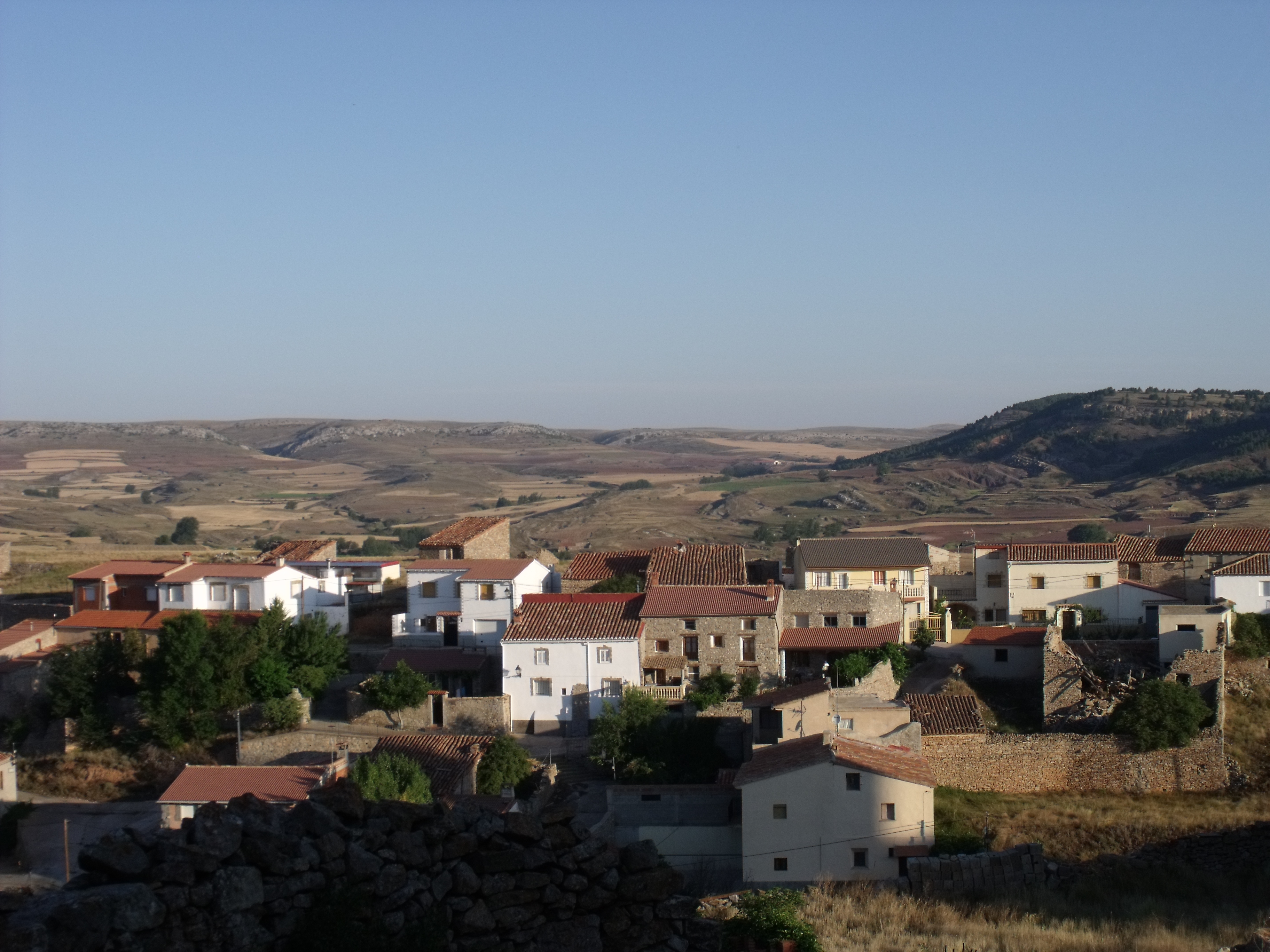 AbabujAragonés: Fababuix